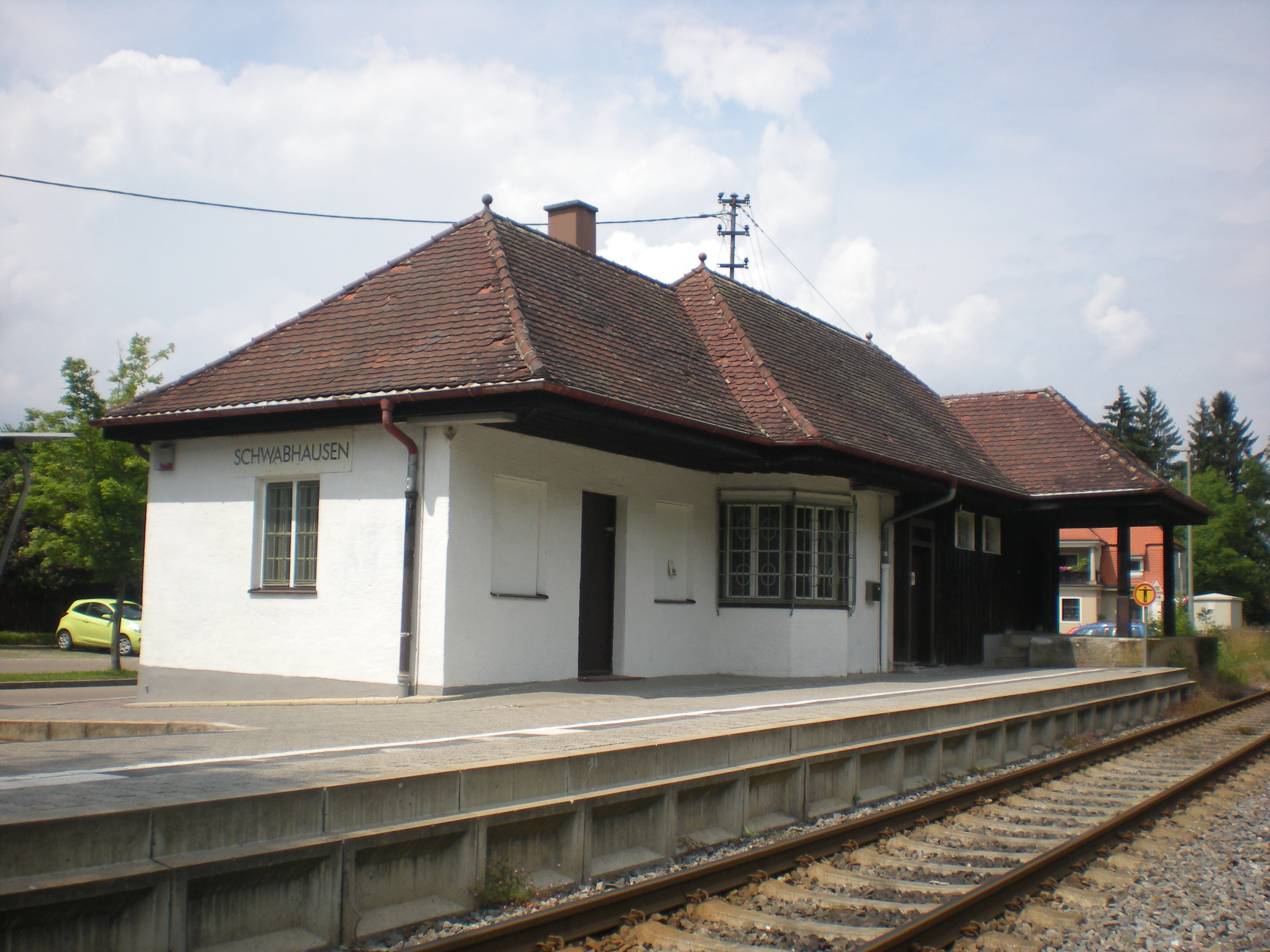 Empfangsgebäude des Haltepunkts Schwabhausen (b Dachau) an der Bahnstrecke Dachau–Altomünster (Linie A) von der Gleisseite